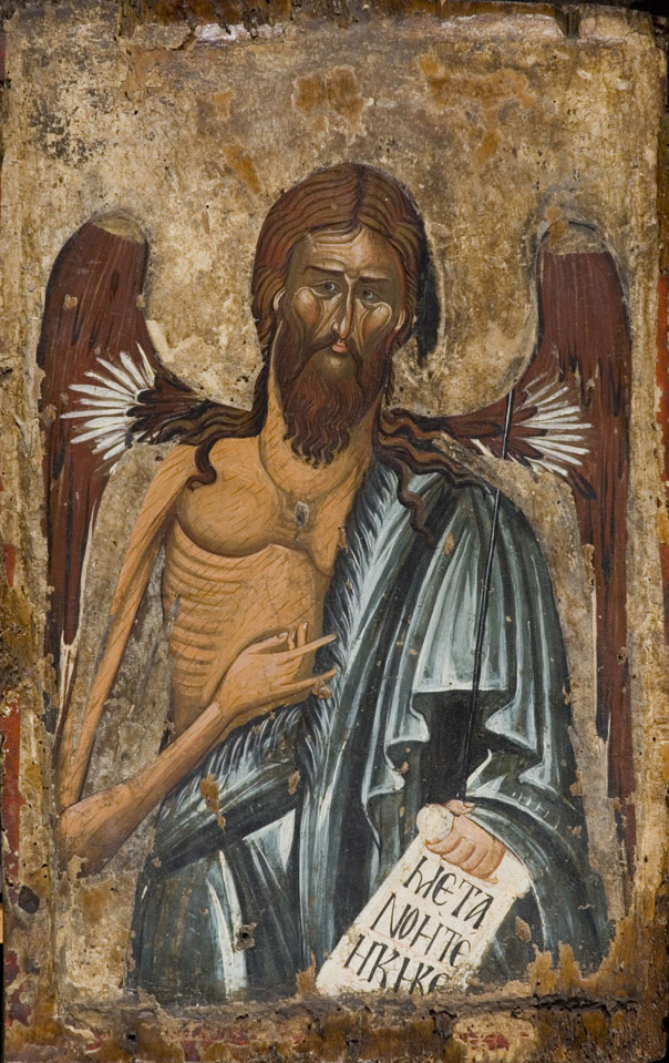 Άγιος Ιωάννης ο Πρόδρομος Δ΄ τέταρτο 15ου αι. Αγία Φωτίδα, Βέροια